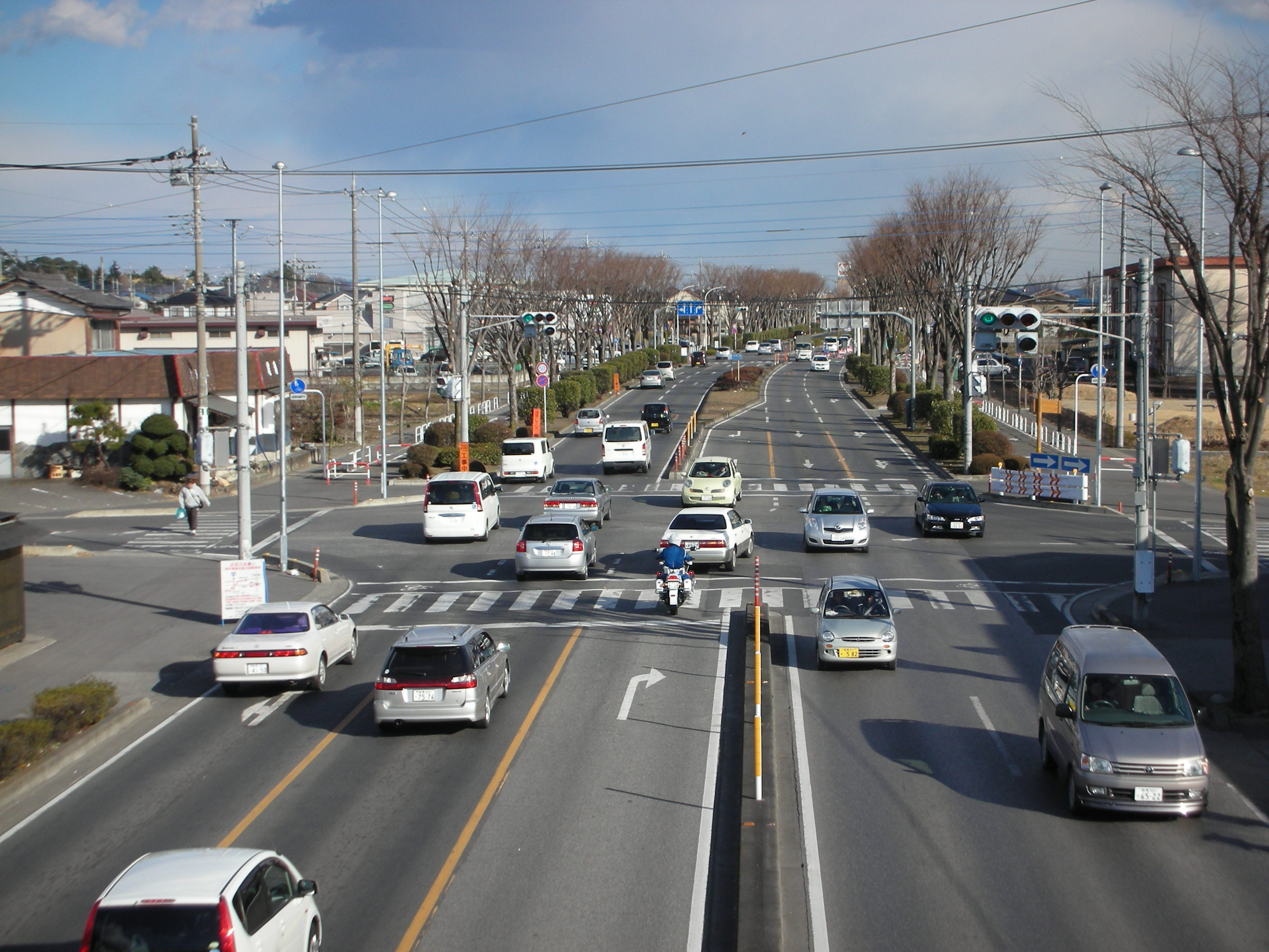 伊勢崎市道北部環状線の外観